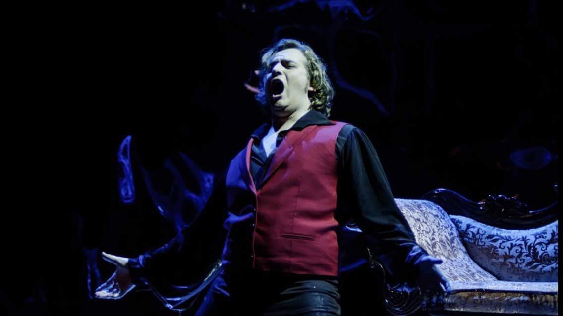 Onegin debiut Teatr Wielki im. S. Moniuszki w Poznaniu 2016